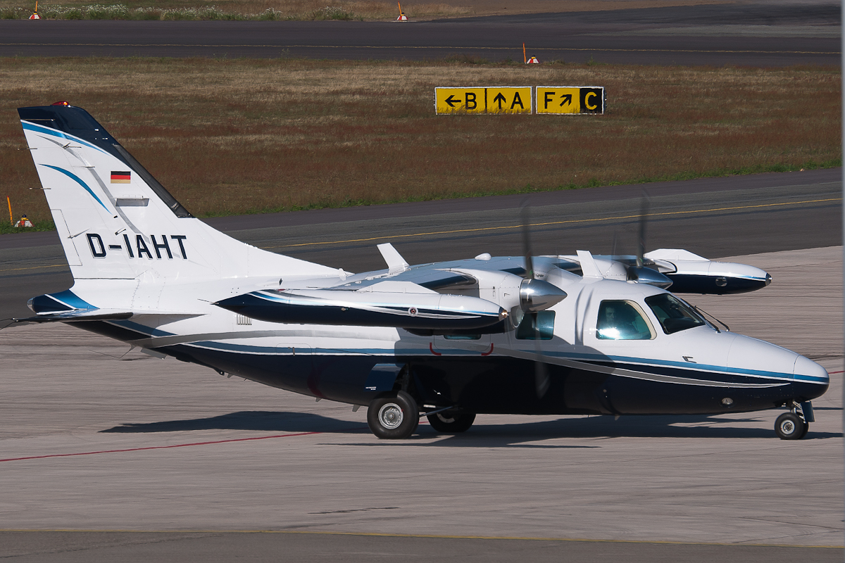 D-IAHT